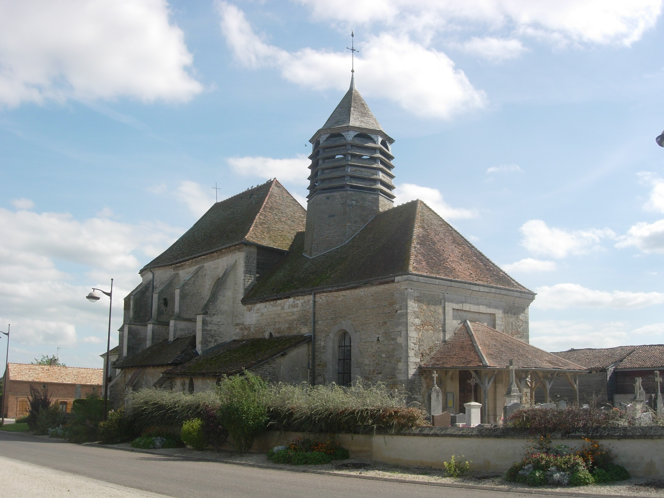 Eglise de Hampigny